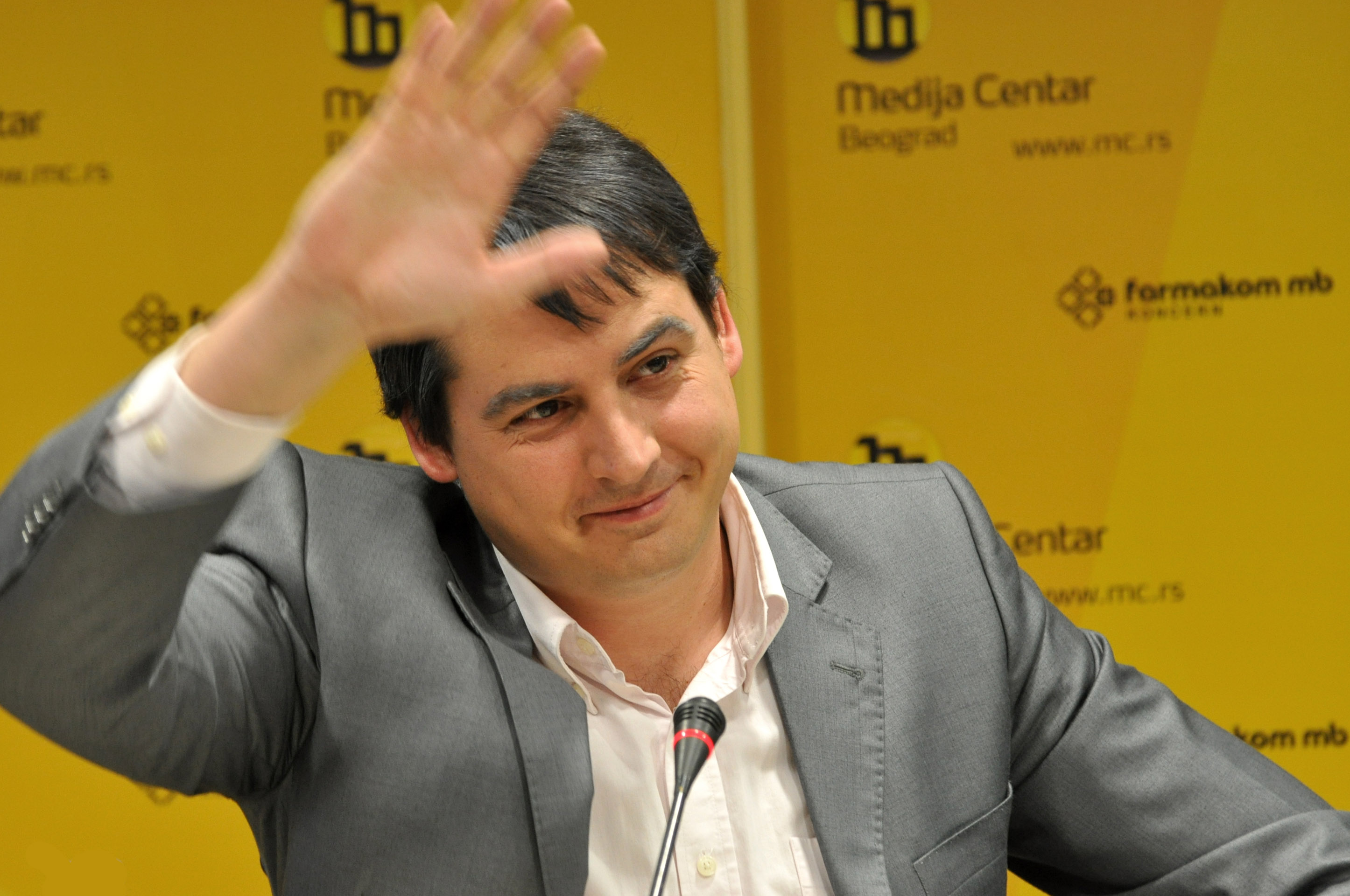 Zoran Kesic